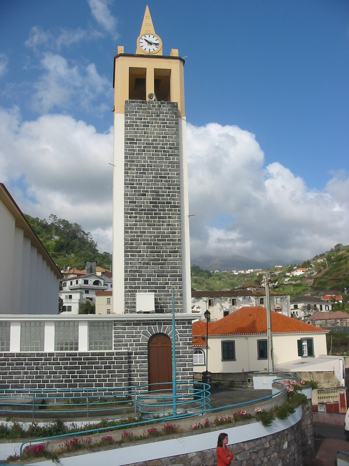 Church, Porto Da Cruz, Madeira